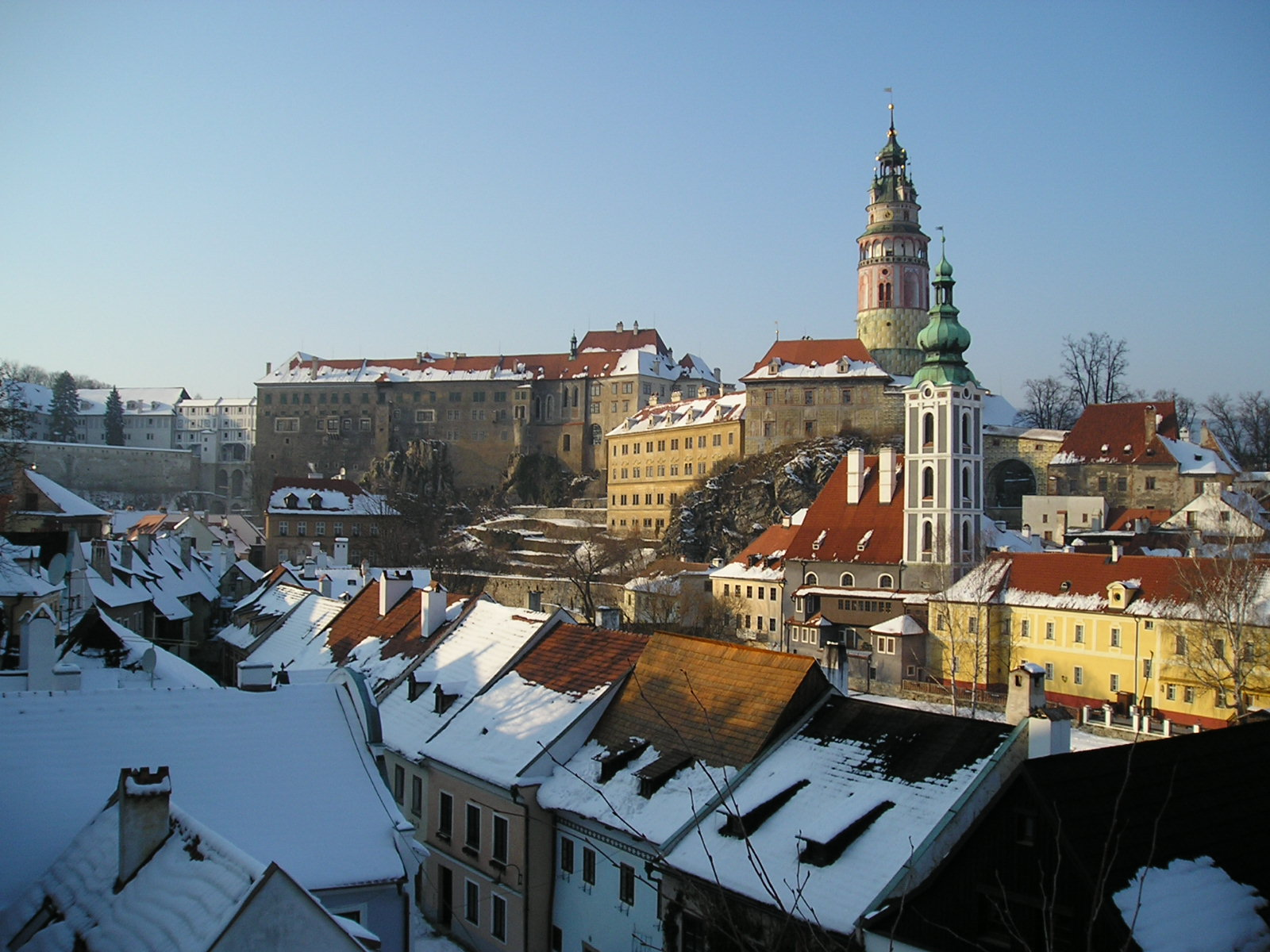 Český Krumlov, Czech Republic, in February 2005.